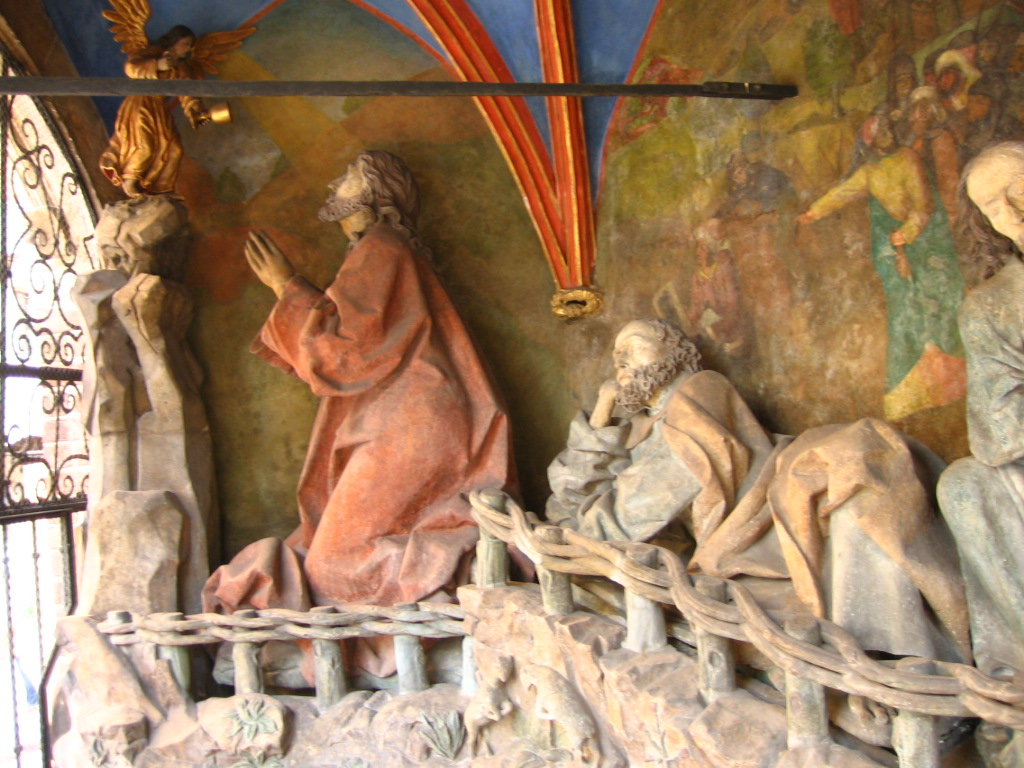 Wnętrze kaplicy cmentarnej zwanej "Ogrojec" przy kościele Św. Barbary w Krakowie.